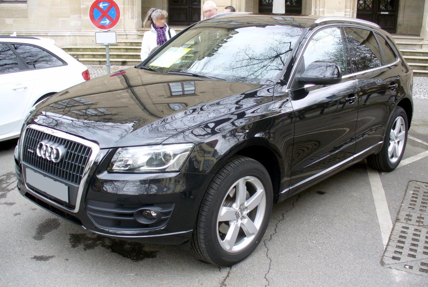 Audi Q5